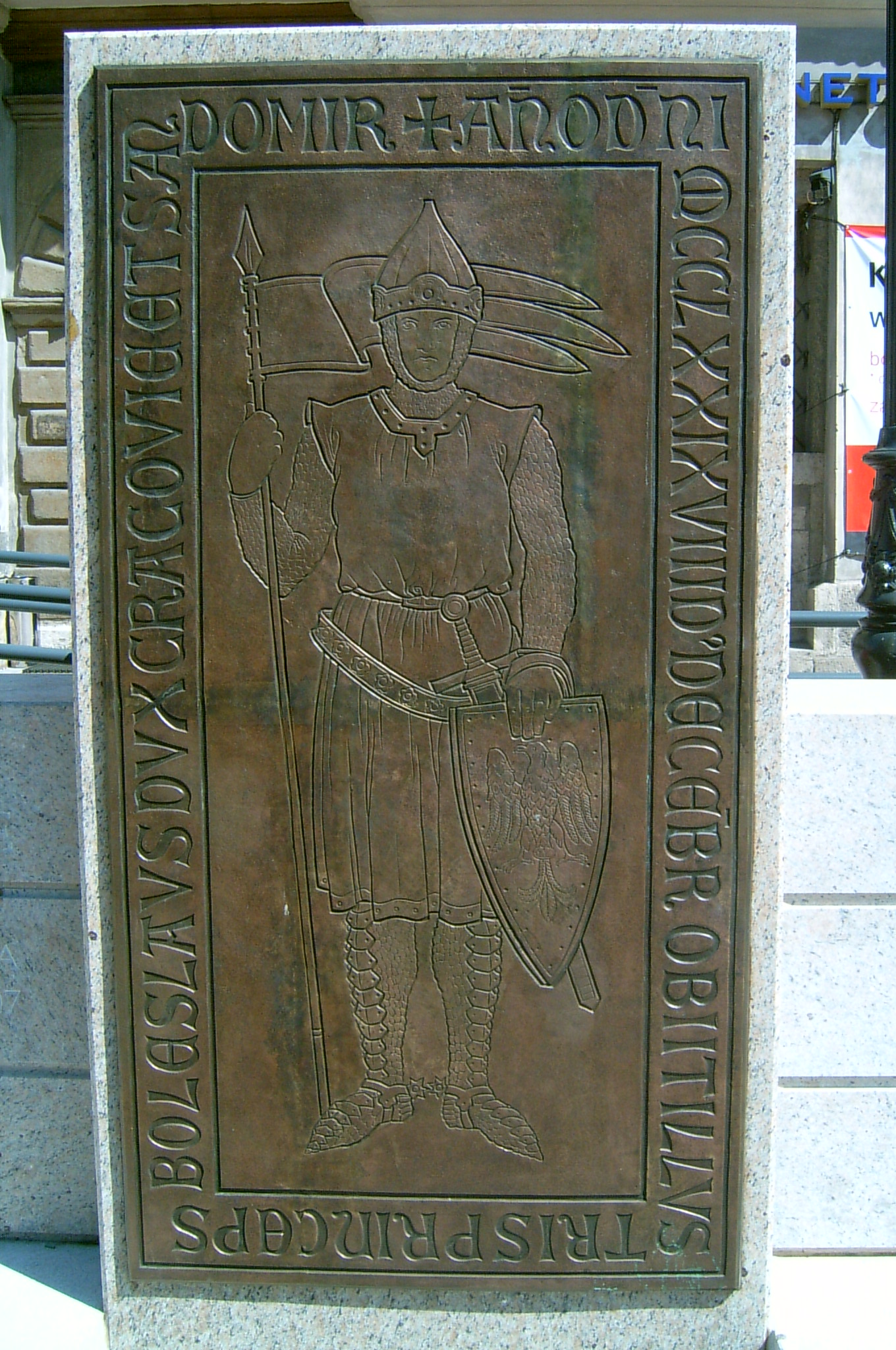 Kraków, Poland